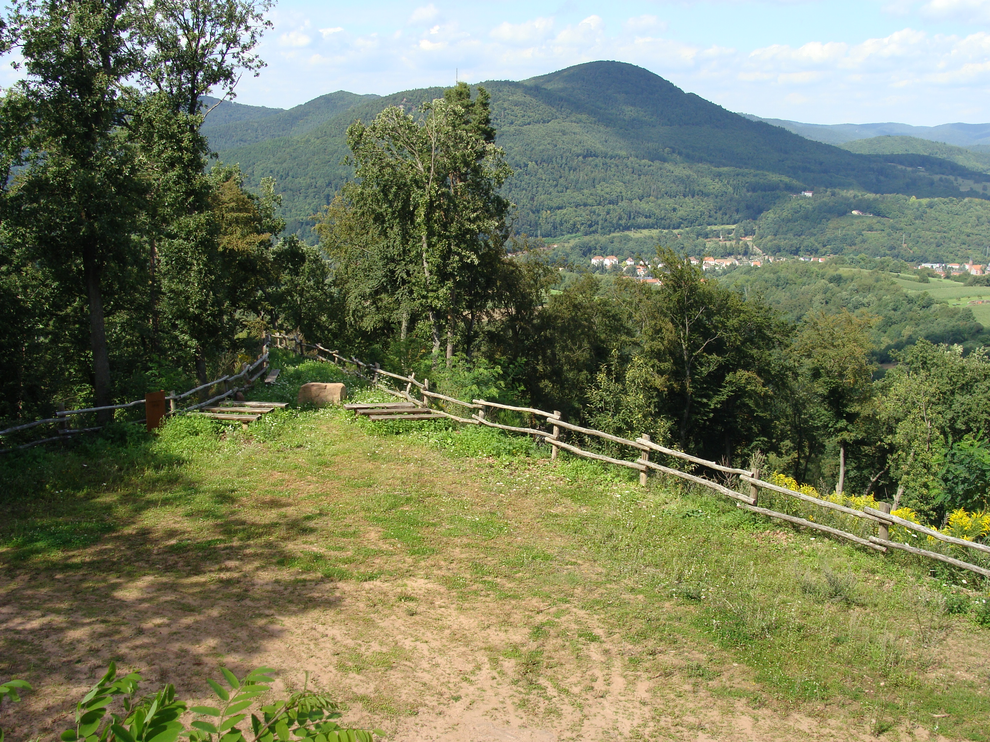 Ebersberg (462 m) im Wasgau/Pfälzerwald - Aussichtspunkt Trifelsblick